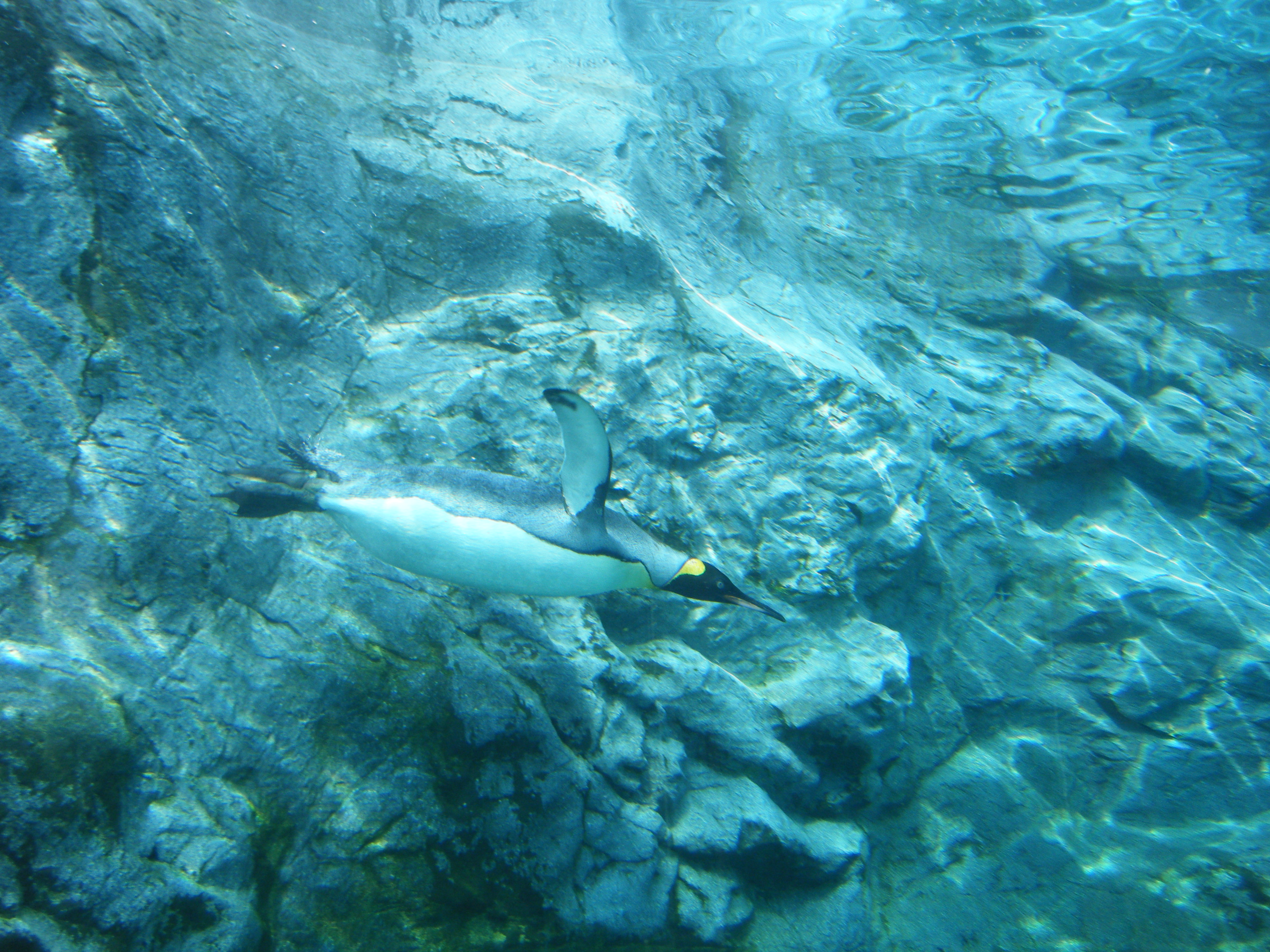 キングペンギンの泳ぐ姿。旭川市旭山動物園にて。